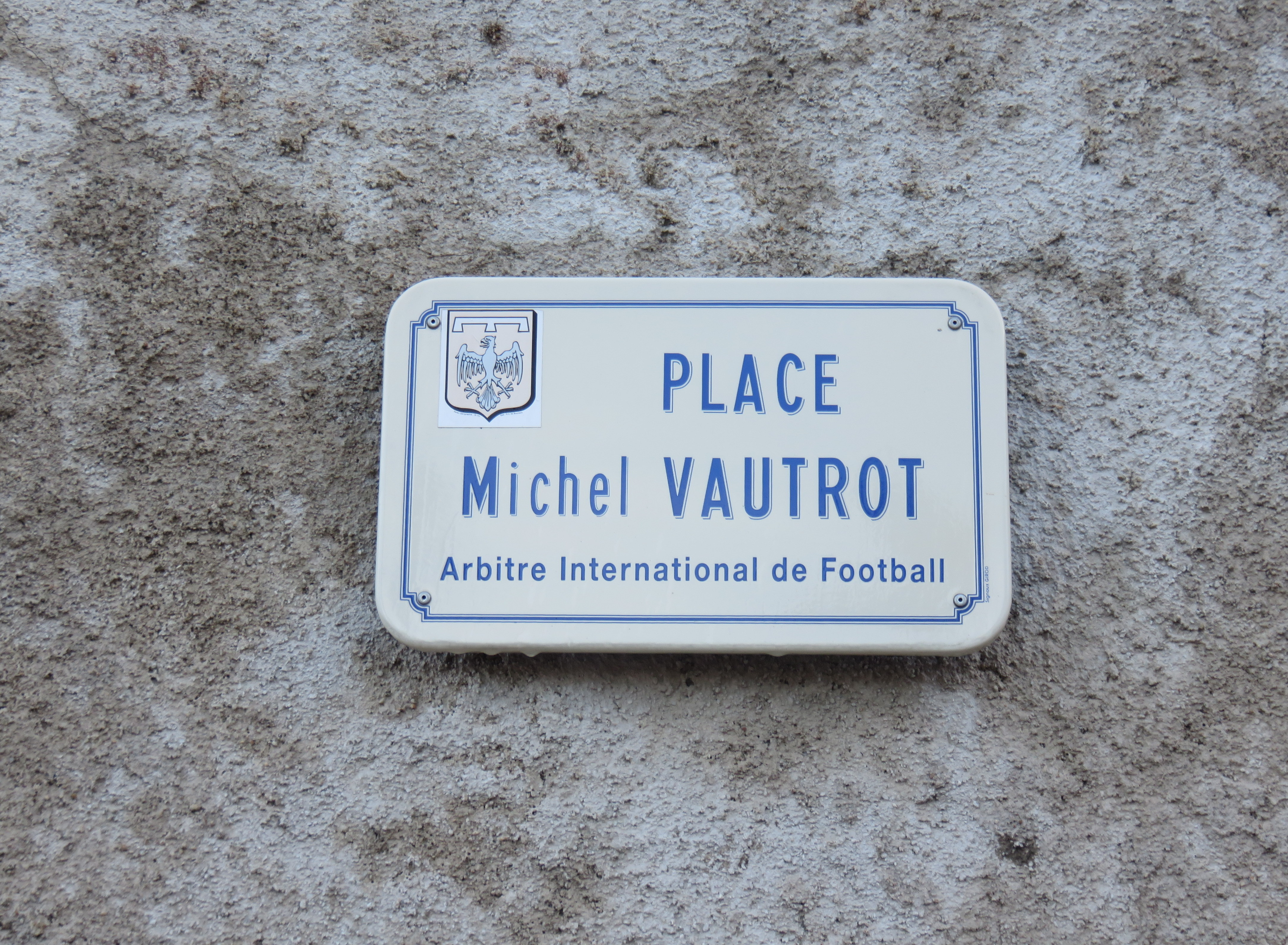 Dampierre (Jura, France) en janvier 2018.